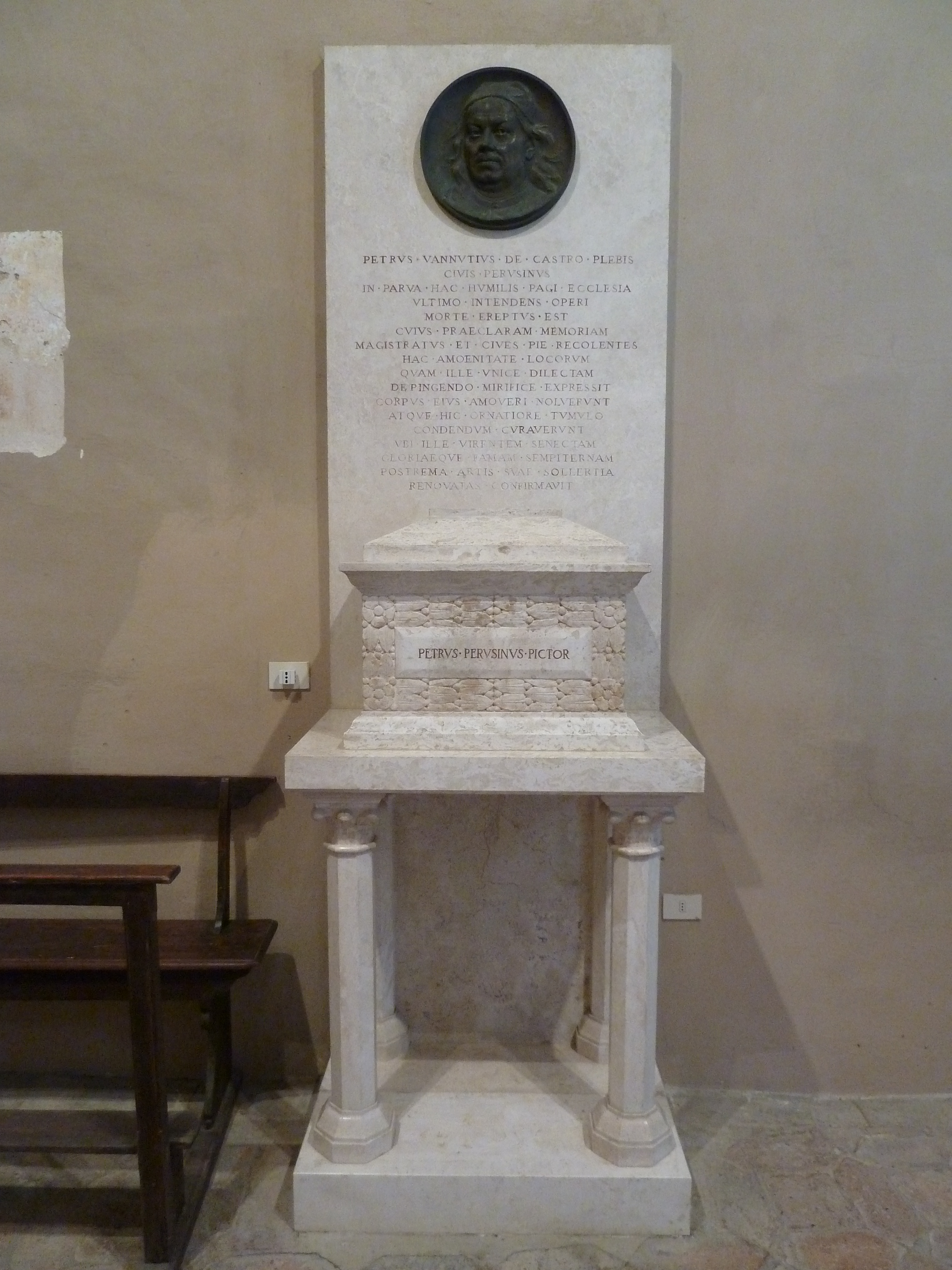 Tombe du Pérugin (Pietro Vannucci) , église musée Santissima Annunziata, Fontignano, Ombrie, Italie.